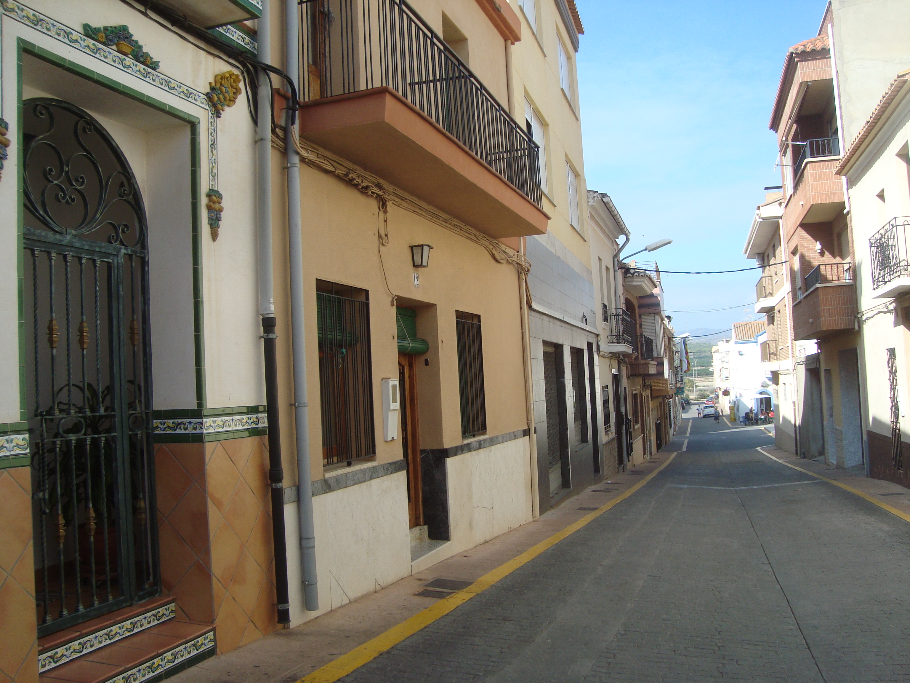 La Llosa (Castelló)